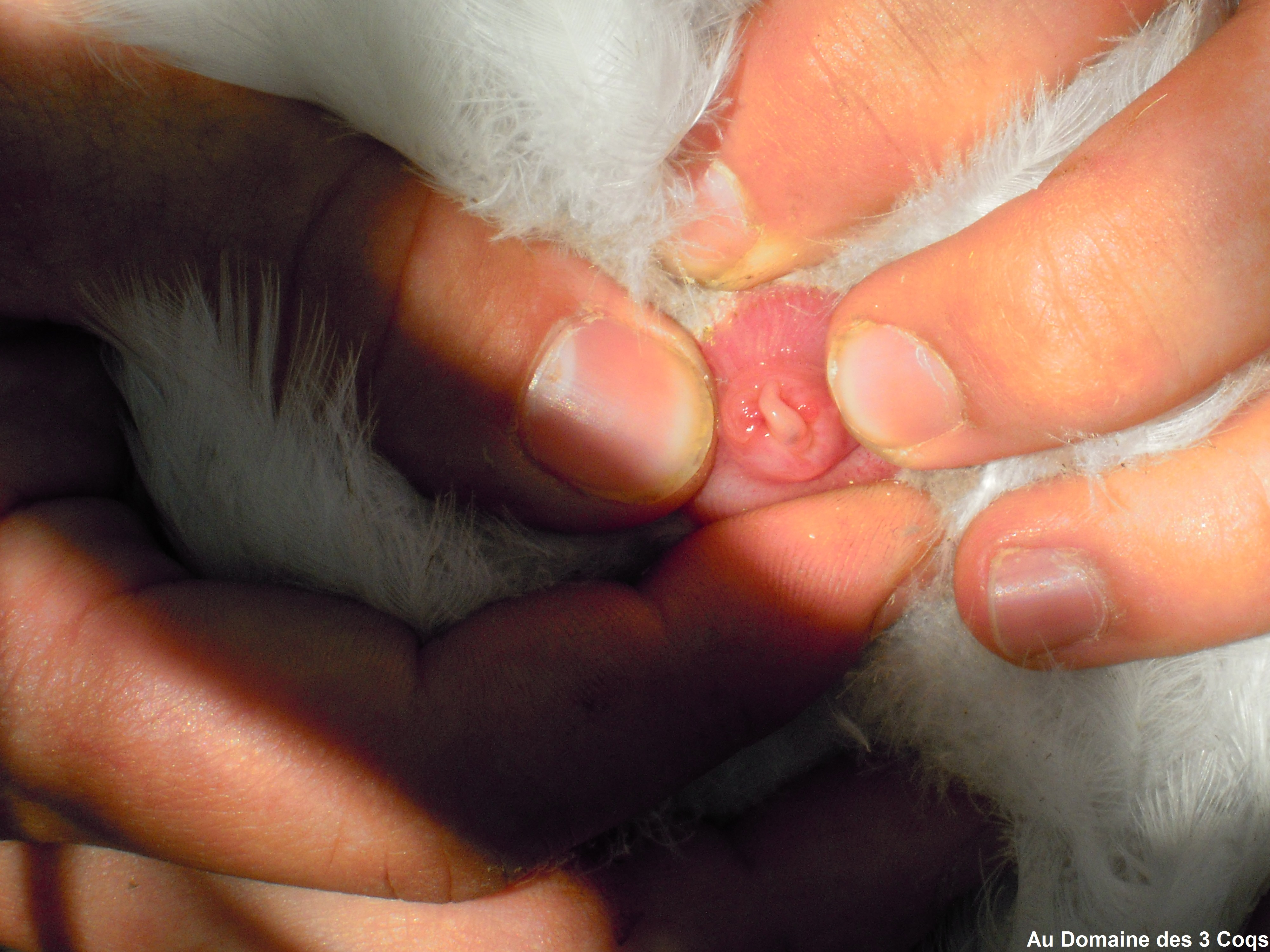 cloaque Male Au Domaine des 3 Coqs